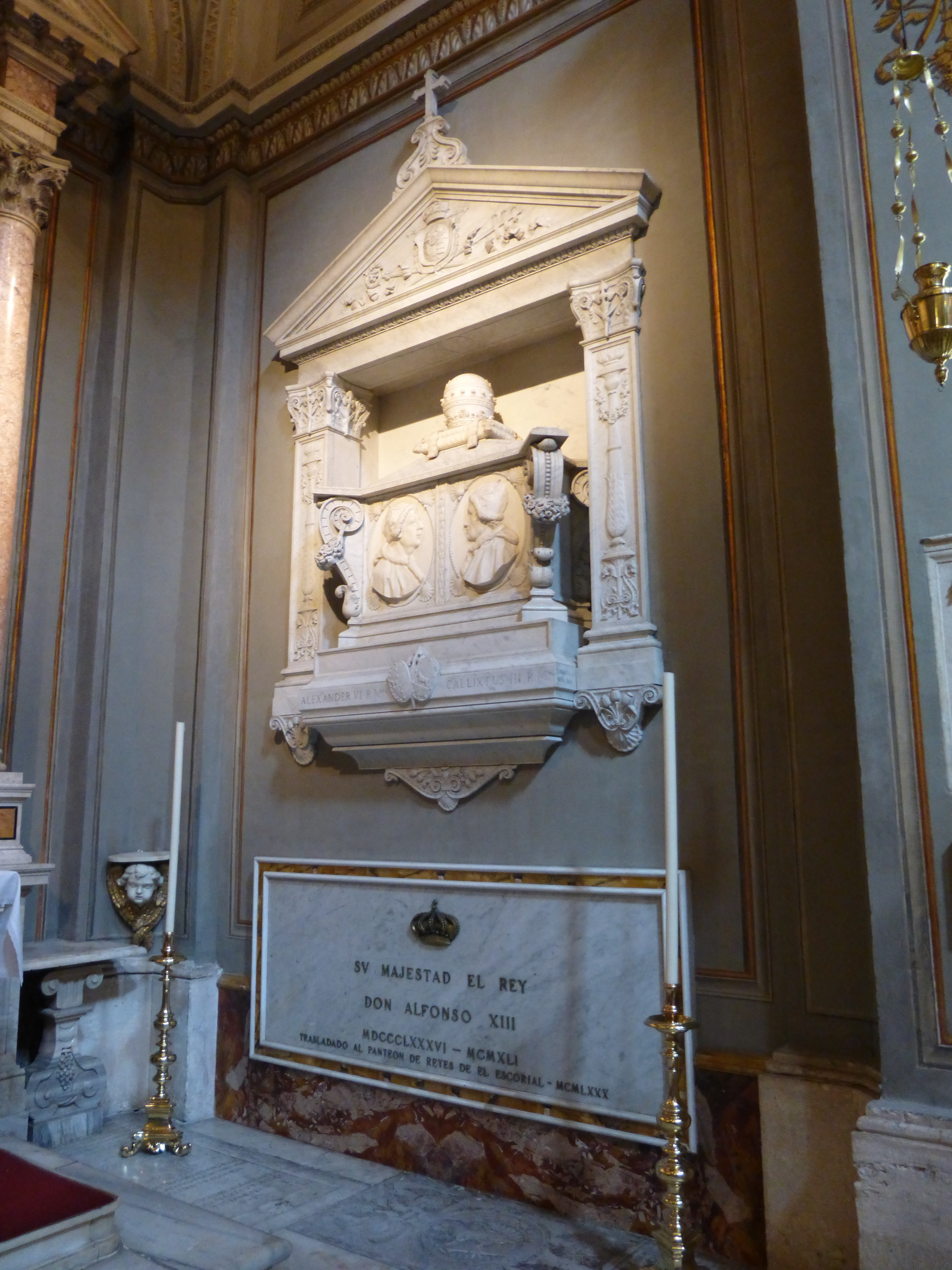 Roma, S. Maria in Monserrato. Tomba dei papi Borgia, Callisto III e Alessandro VI. Sotto, il cenotafio del re Alfonso XIII di Spagna; la tomba fu trasferita all'Escorial nel 1980.